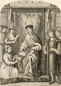 Portrait de Claude de Seyssel' évêque de Marseille, présentant au roi Louis XII, la traduction en français du livre de Thucydide